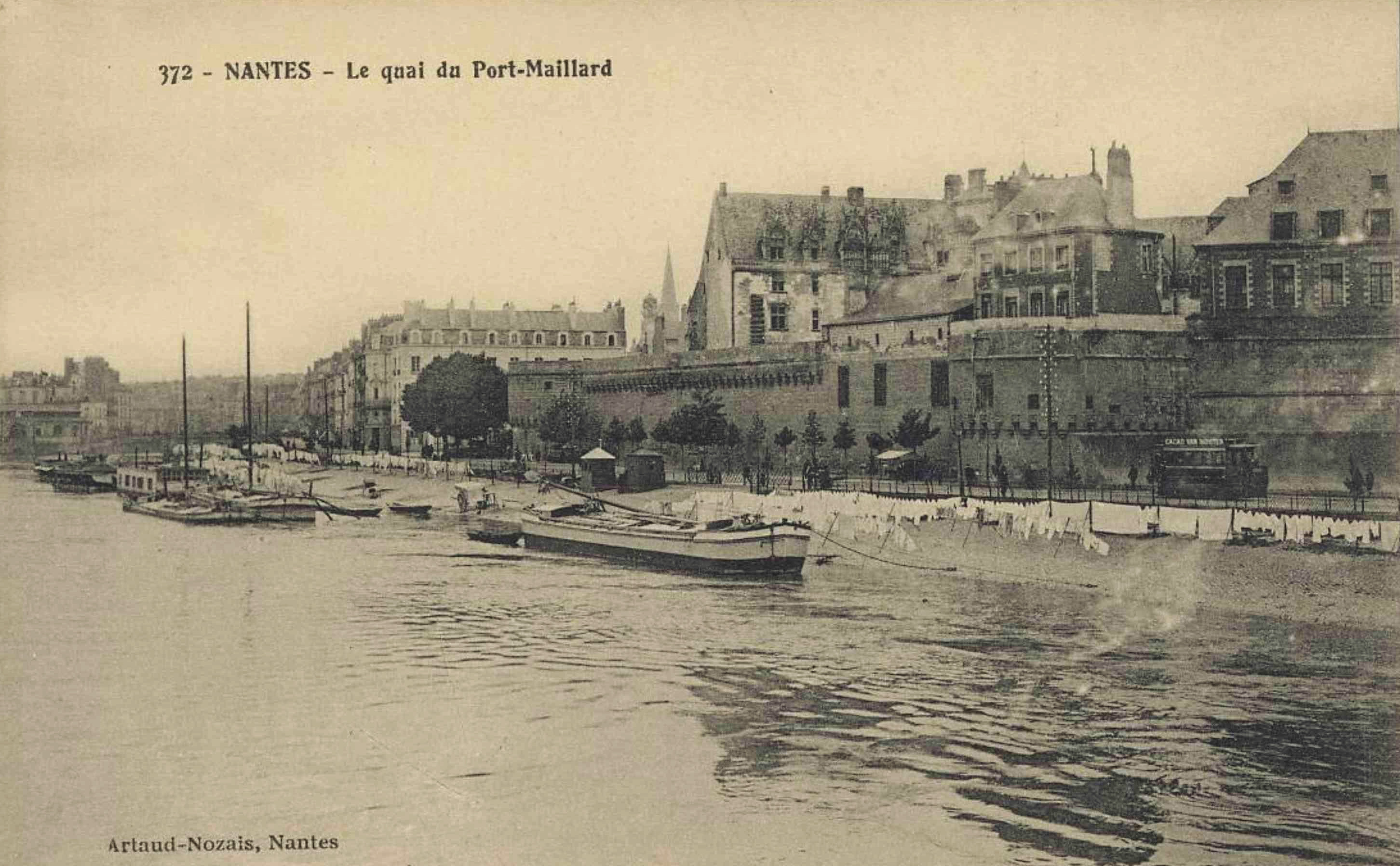 Vue du Château des ducs de Bretagne et du quai du Port-Maillard, Nantes. Carte postale ancienne.